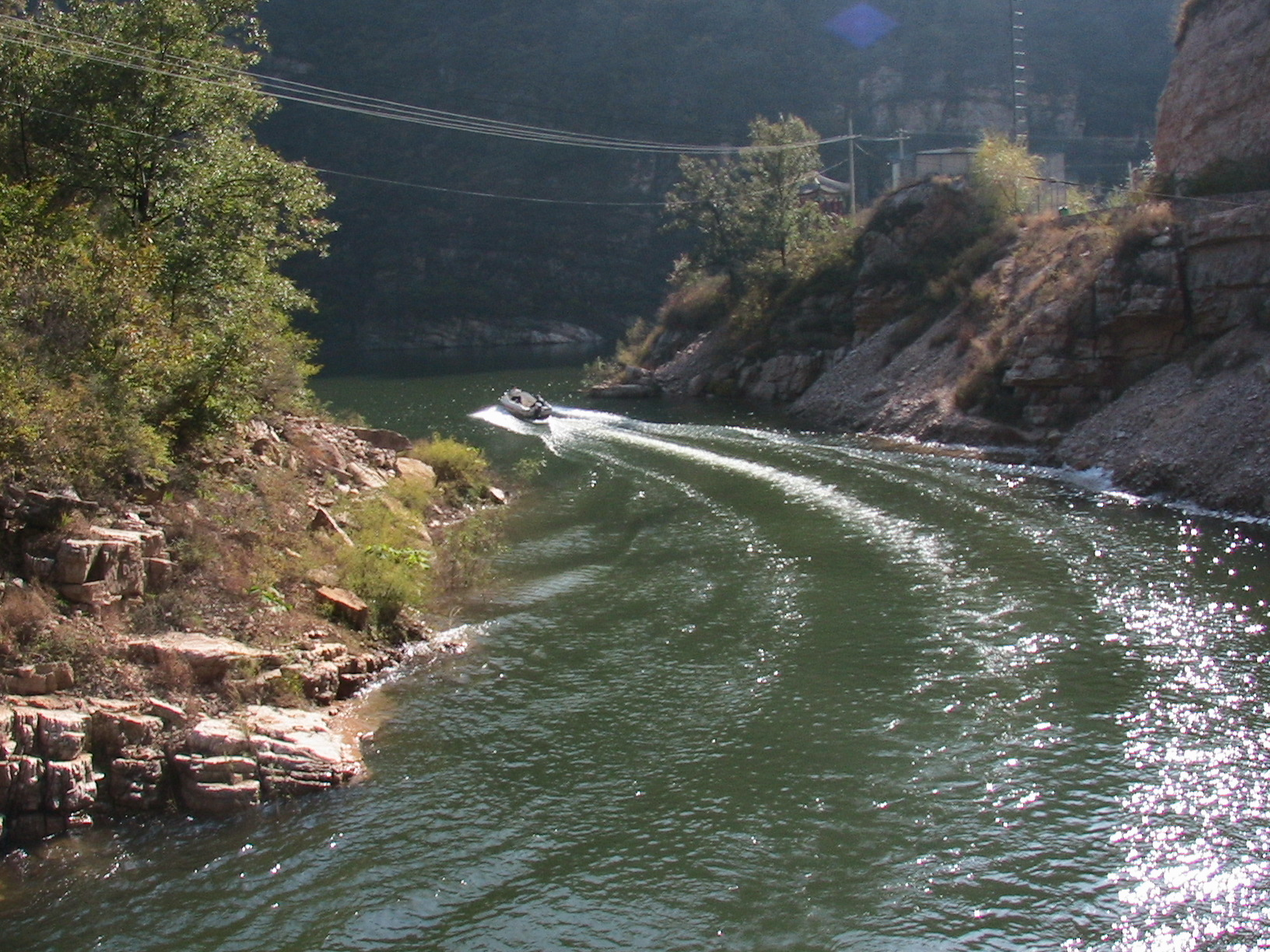 自拍